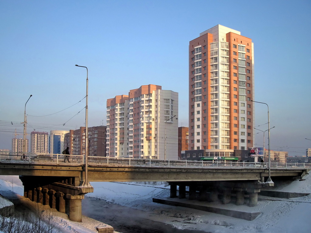 Ул. Павловского